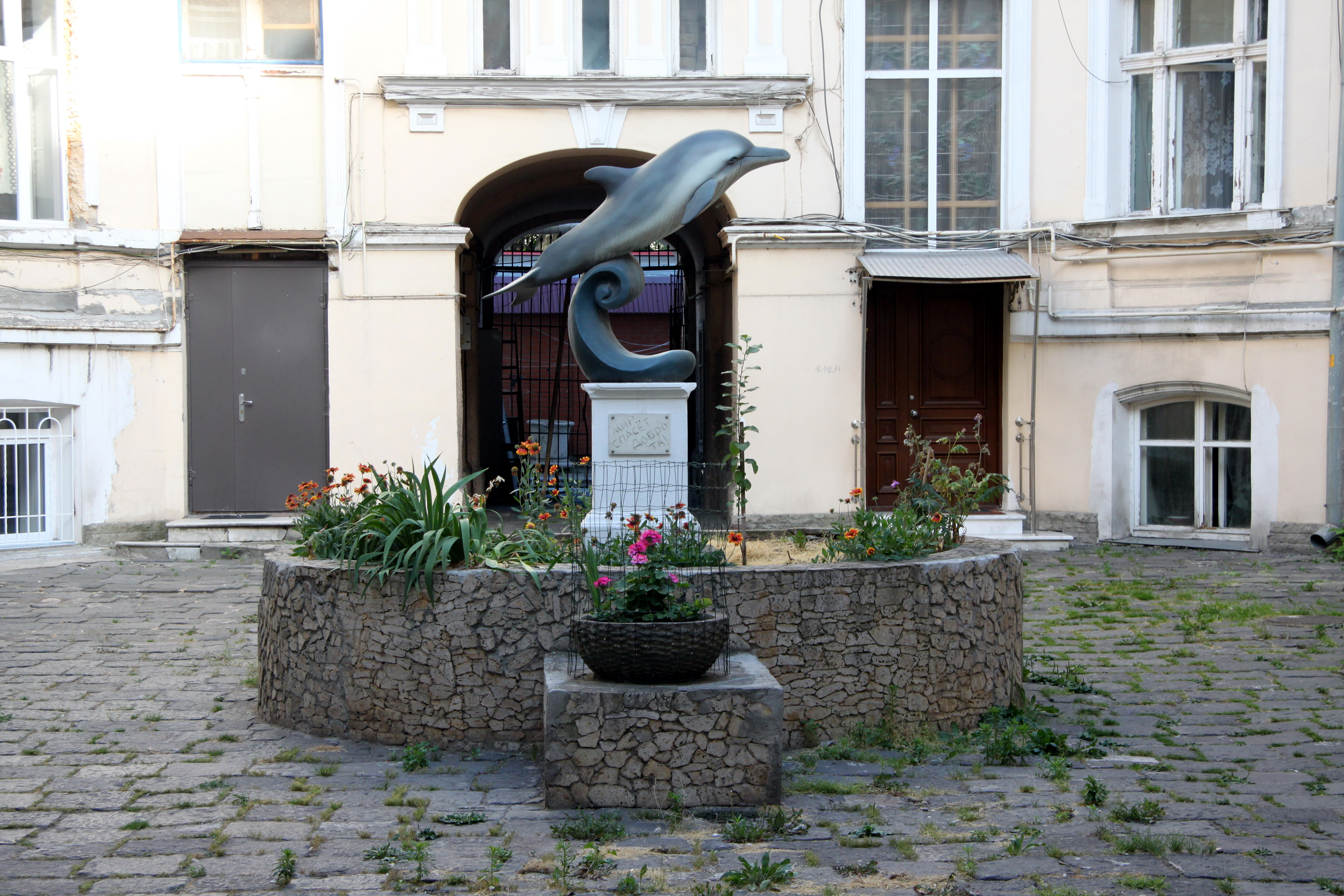 Будинок житловий, Торгова вул., 3, Одеса